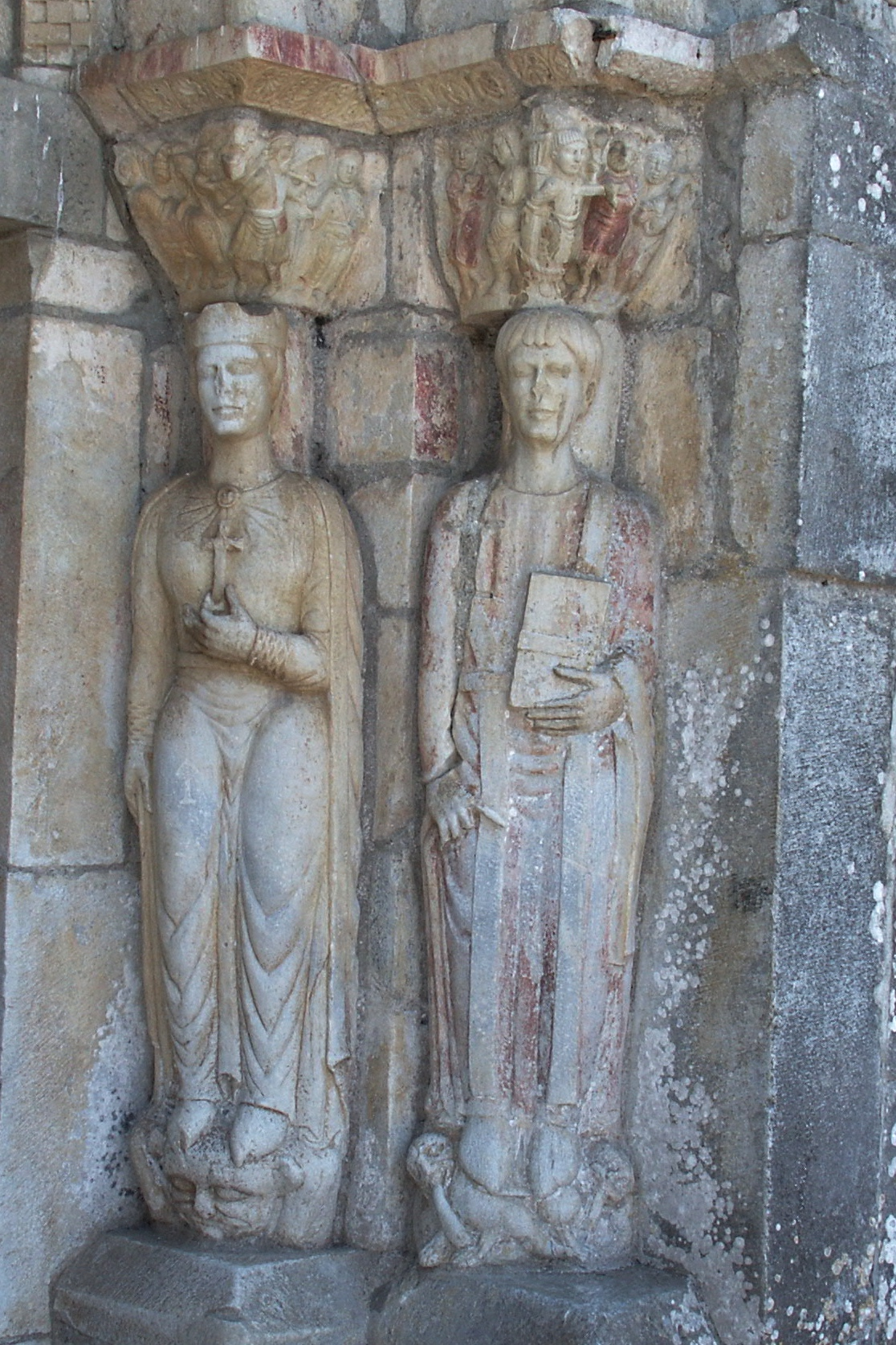 Nordportal, rechte Seite: St. Pastor und Kaiserin Helena, Saint-Just-de-Valcabrère